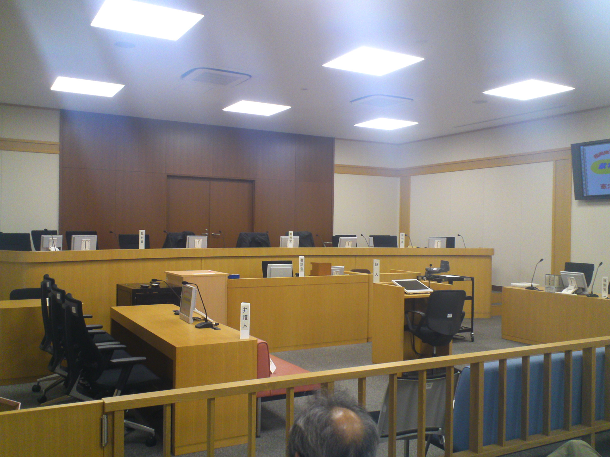 地方裁判所の裁判員裁判がおこなわれる法廷の様子です。 撮影許可は頂いております。